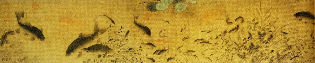 Poissons nageant parmi les fleurs tombées (détail 1) par le peintre chinois Liu Cai. Rouleau portatif, encre et couleurs sur soie, datée 1075. (26,4x252,2cm). Saint Louis - Musée d'art de Saint-Louis - (City Art Mus.) (Acquisition: Fonds d'art oriental W.K. Bixbi)